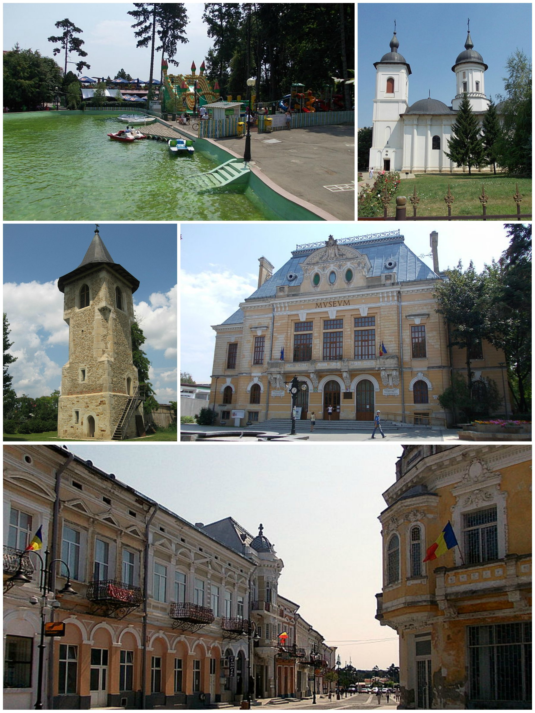 imagini din municipiul Botoşani